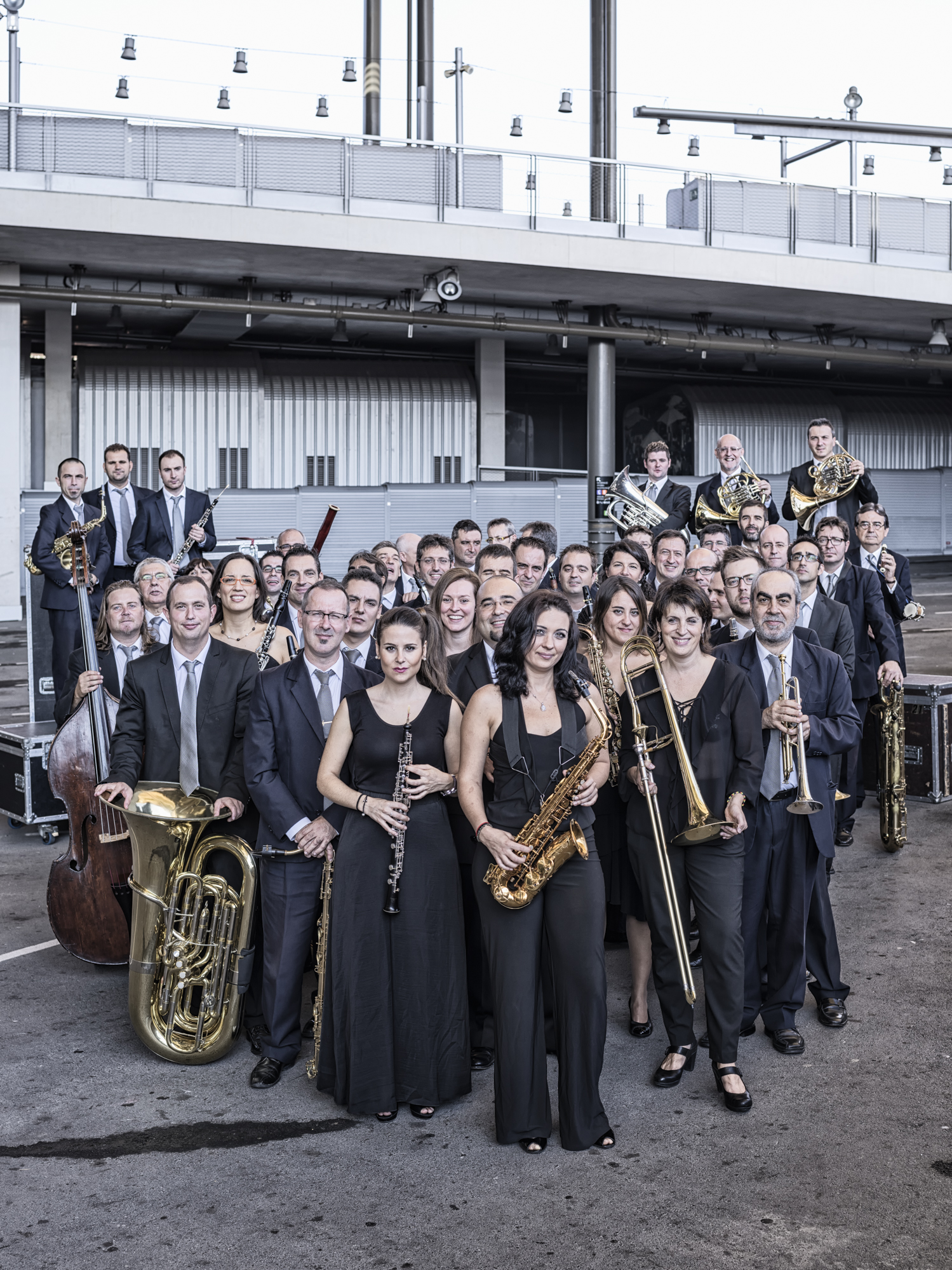 Retrat de la Banda Municipal de Barcelona